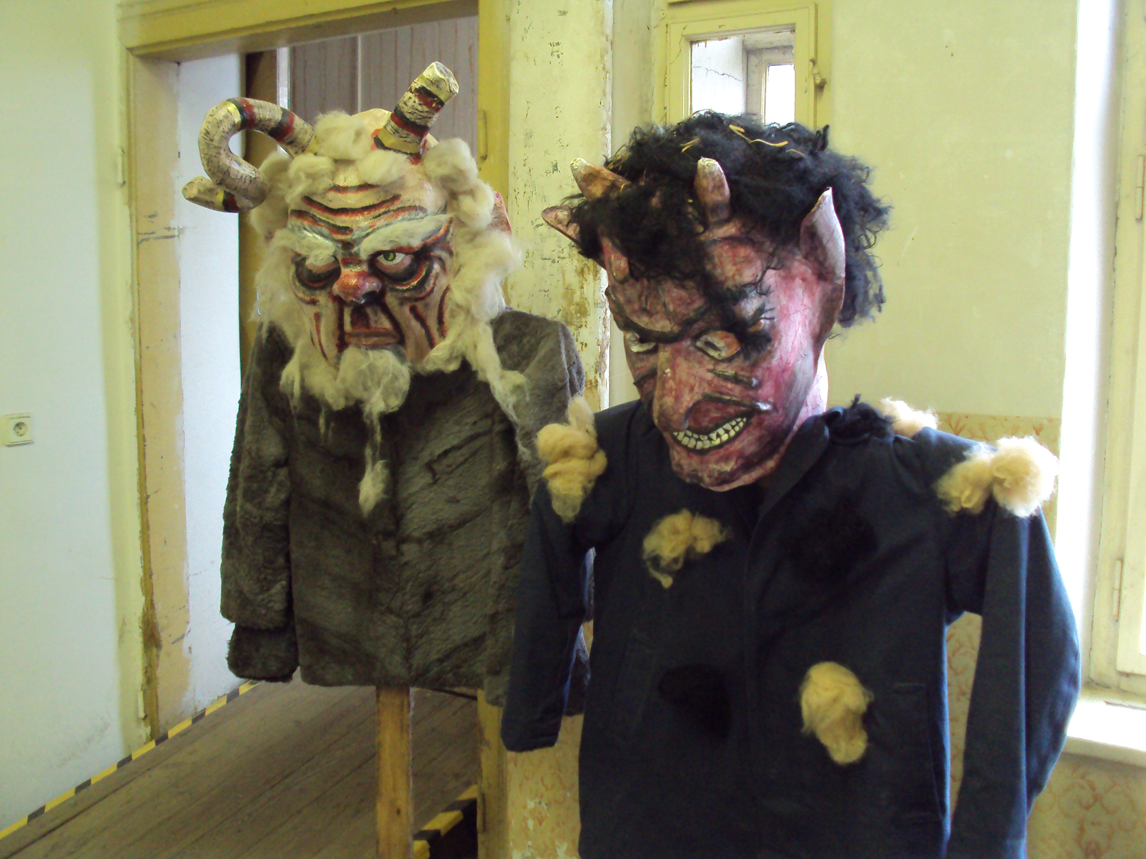 Exponát masek v Eduard Held muzeu na zákupském náměstí, ukázka na chodbě